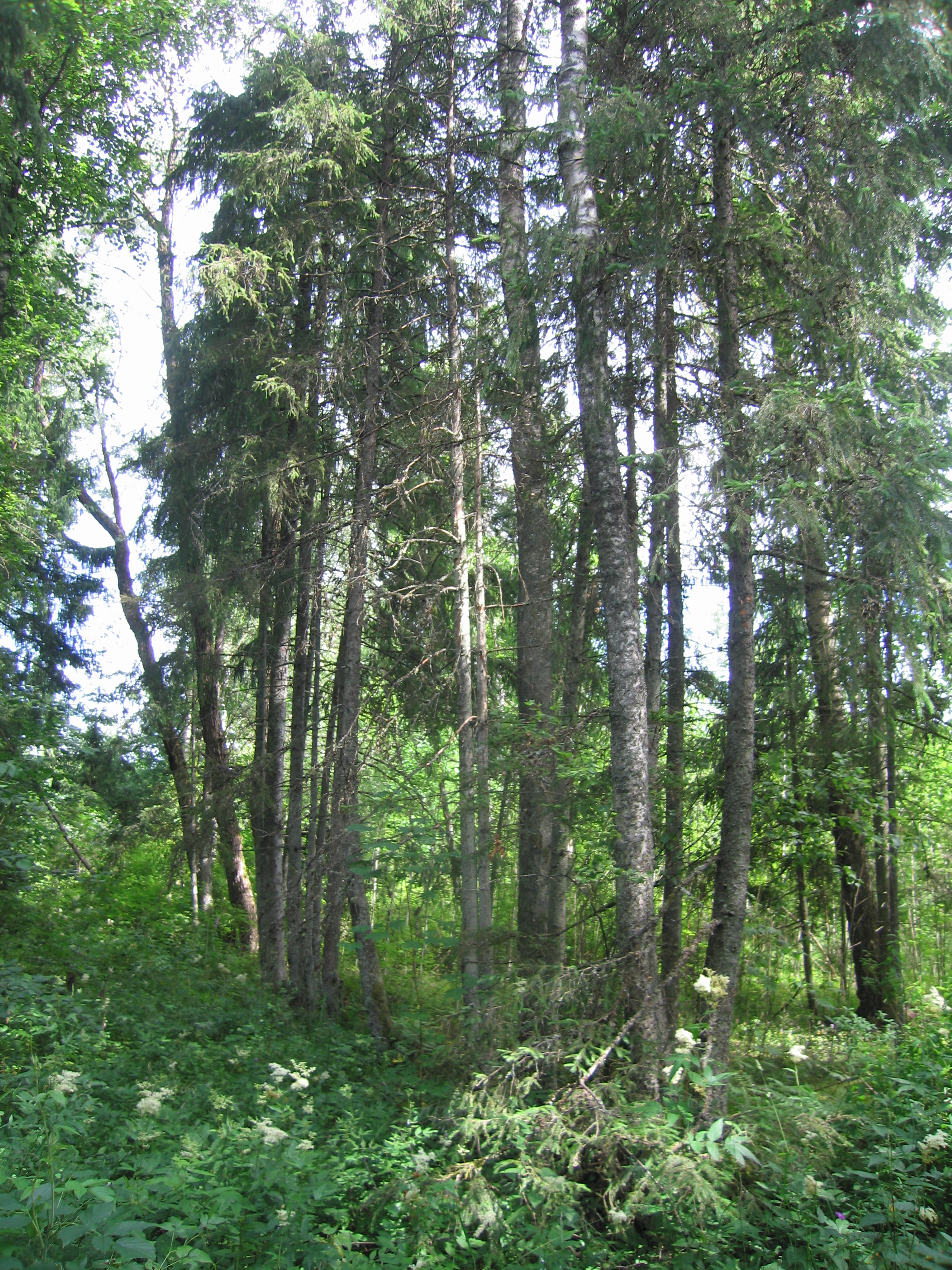 Kalmistule viiva puiestee kirdeserv